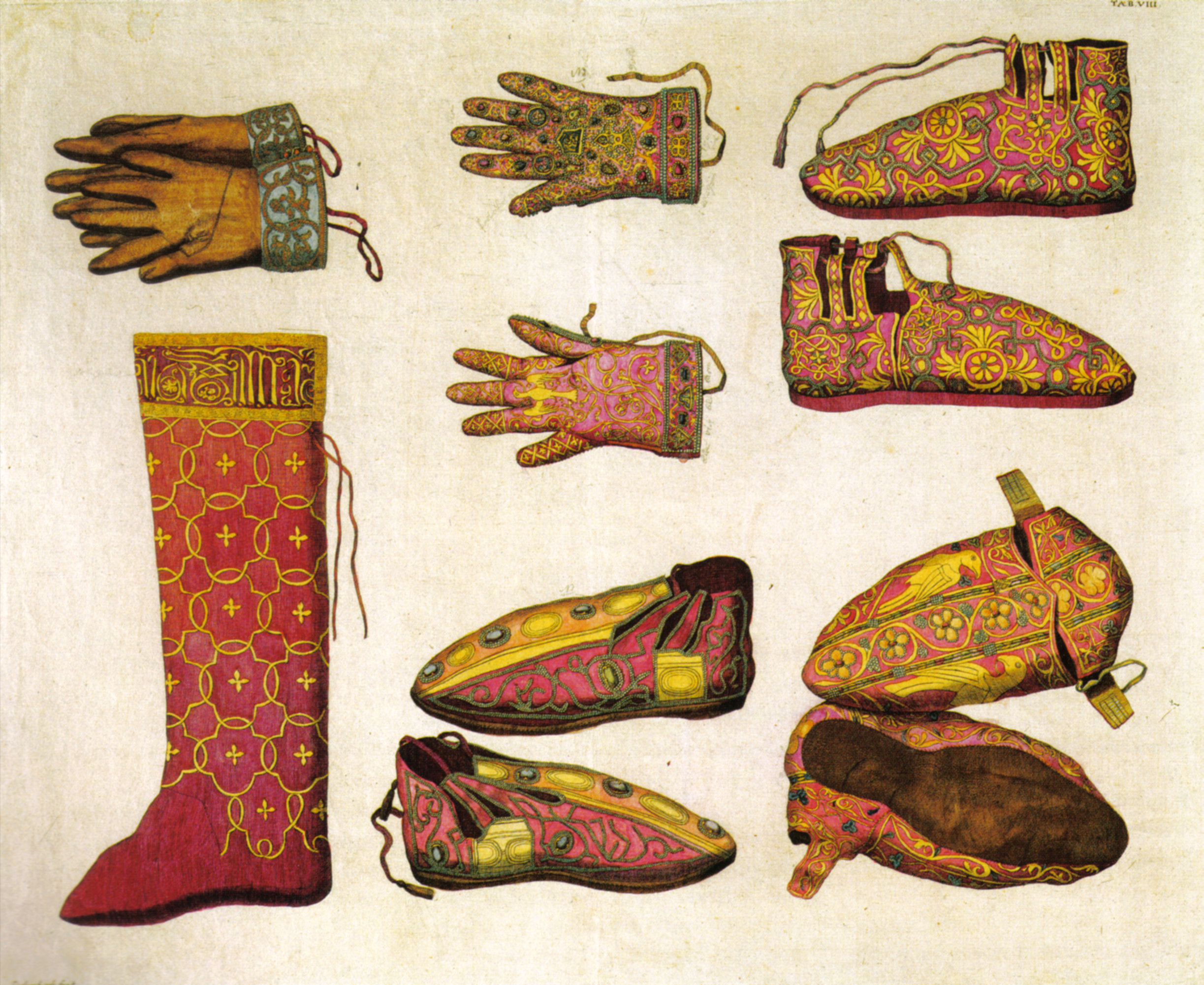 Kupferstich mit Strümpfe, Handschuhe, Schuhe der Reichskleinodien Künstler: Johann Adam Delsenbach, 1790, Nürnberg